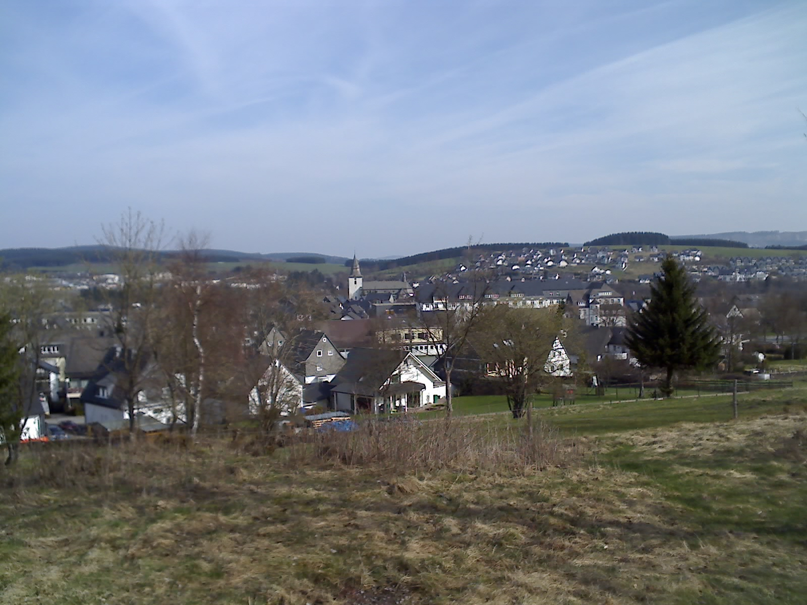 Ansicht Winterberg von Süden